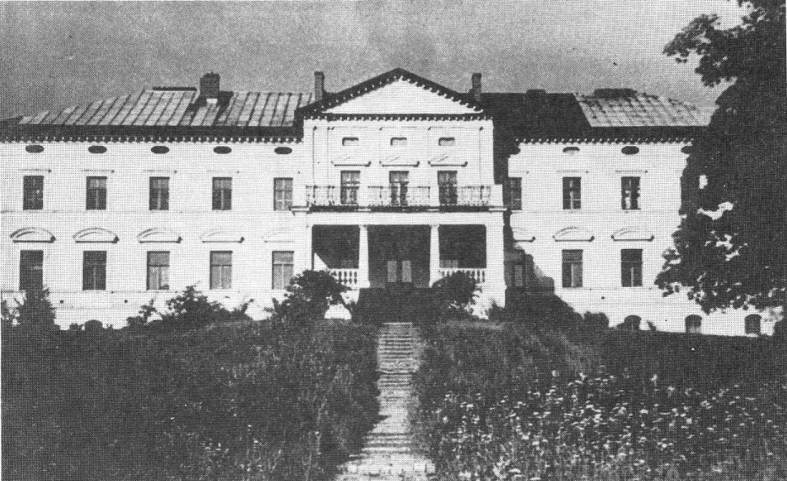 Plinkšių dvaras apie 1939